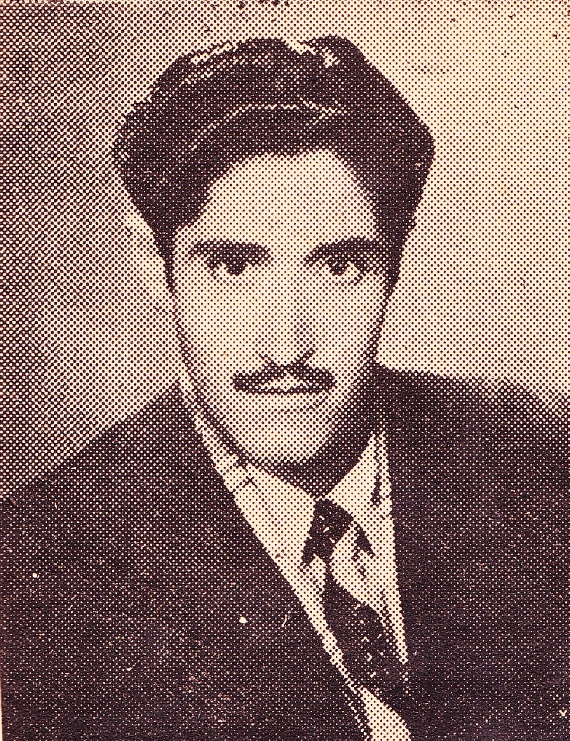 صورة للشاعر البناء مجيد لطيف القيسي في ريعان شبابه